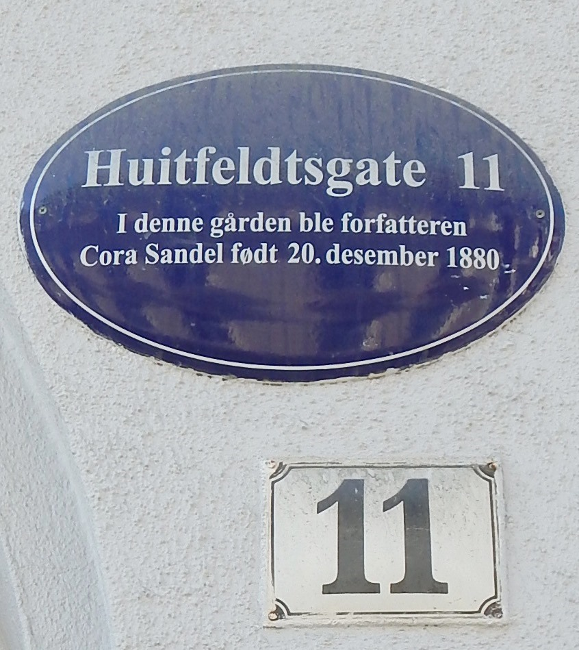 Huitfeldts gate 11. Arkitekt August Tidemand (1875). I denne gården ble forfatteren Cora Sandel født 20. desember 1880, jf. blå plakett.